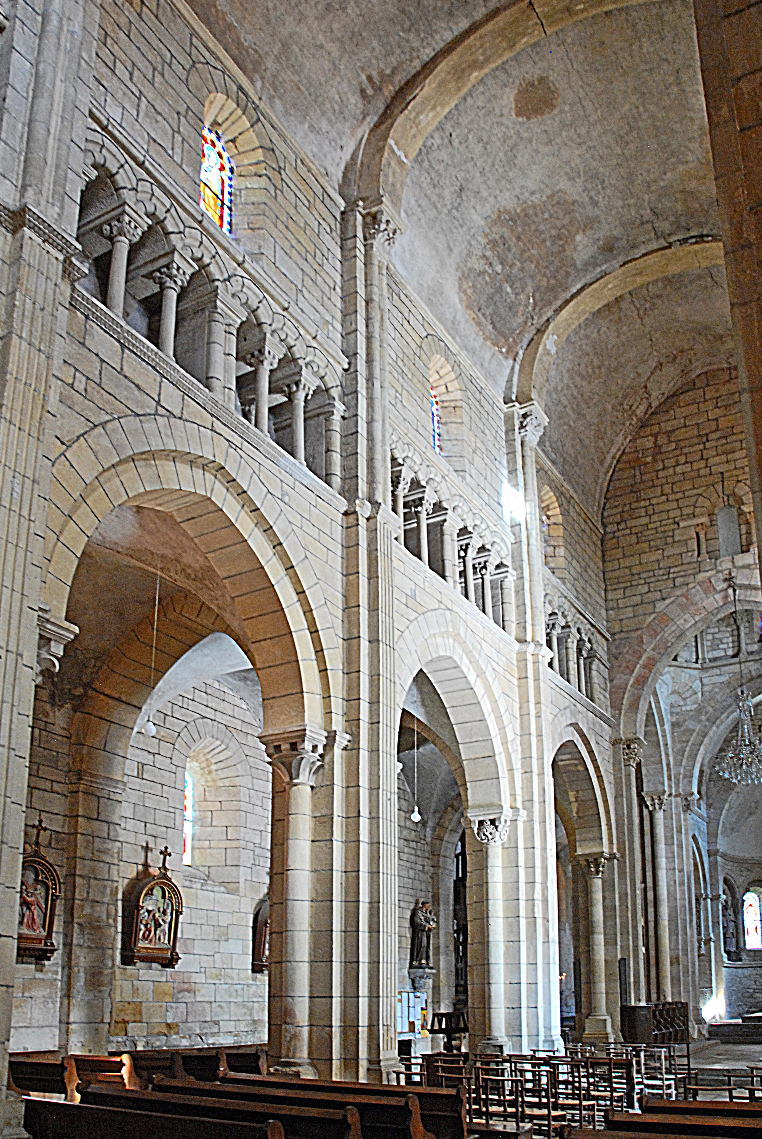 St-Hilaire de Semur-en-Brionnais, Nordwand Mittelschiff, Joche 2-4